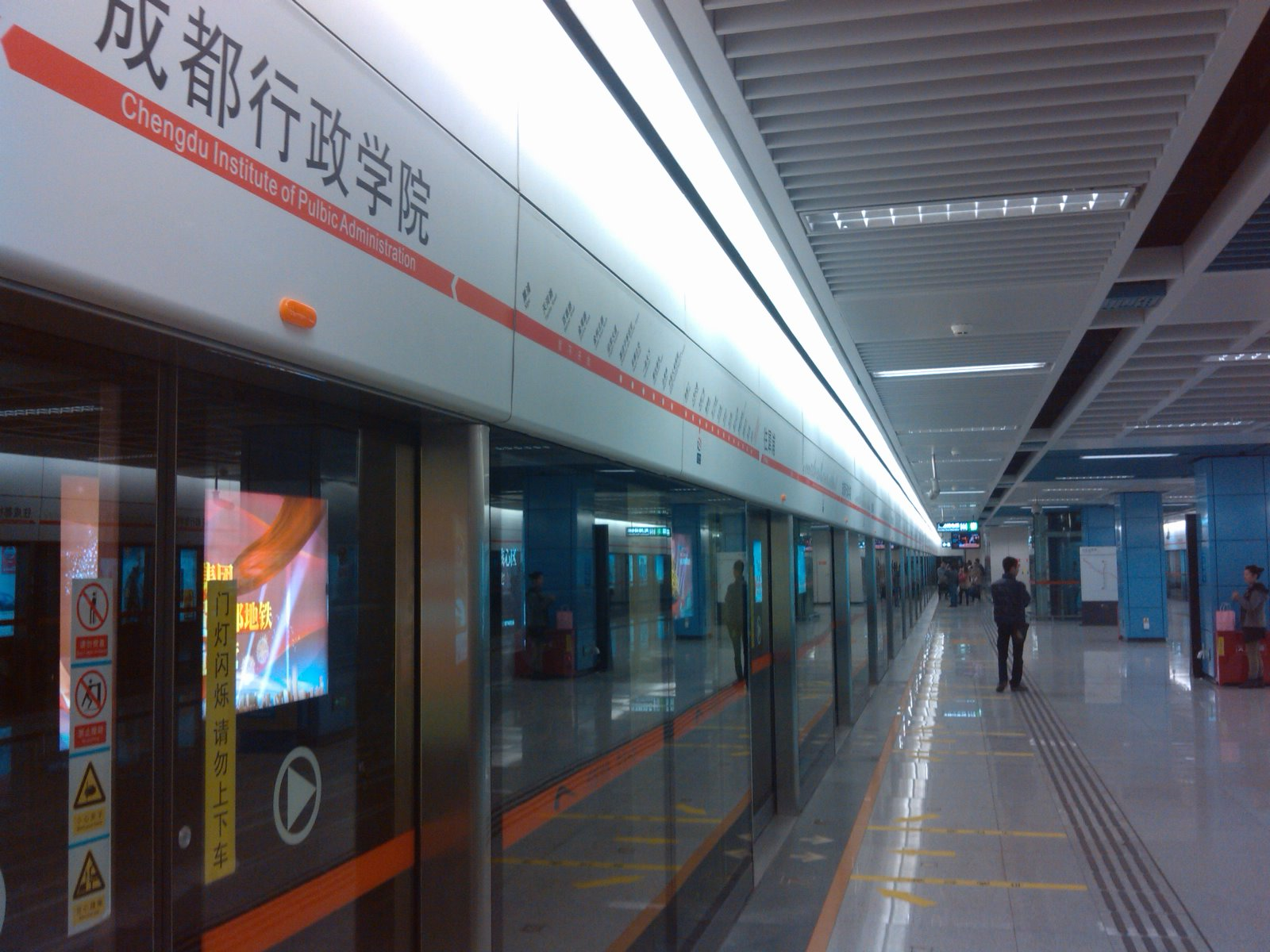 成都地铁2号线成都行政学院站站台